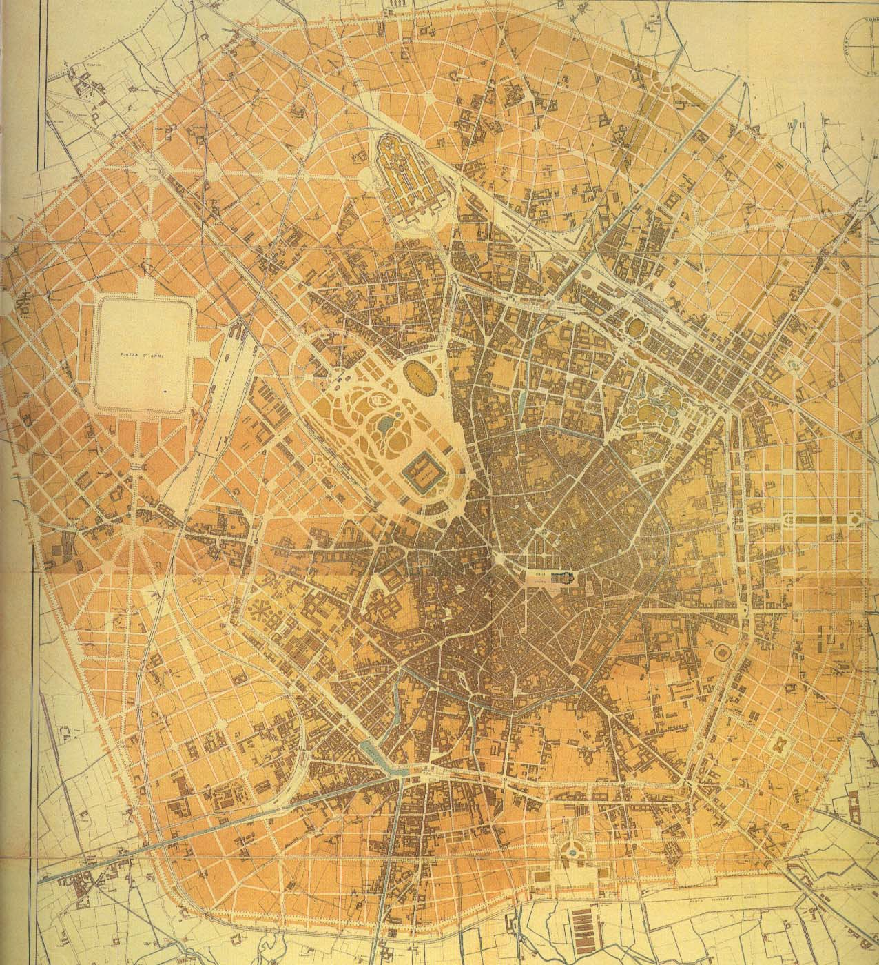 Il piano definitivo dell'ing. Cesare Beruto, approvato nel 1889.